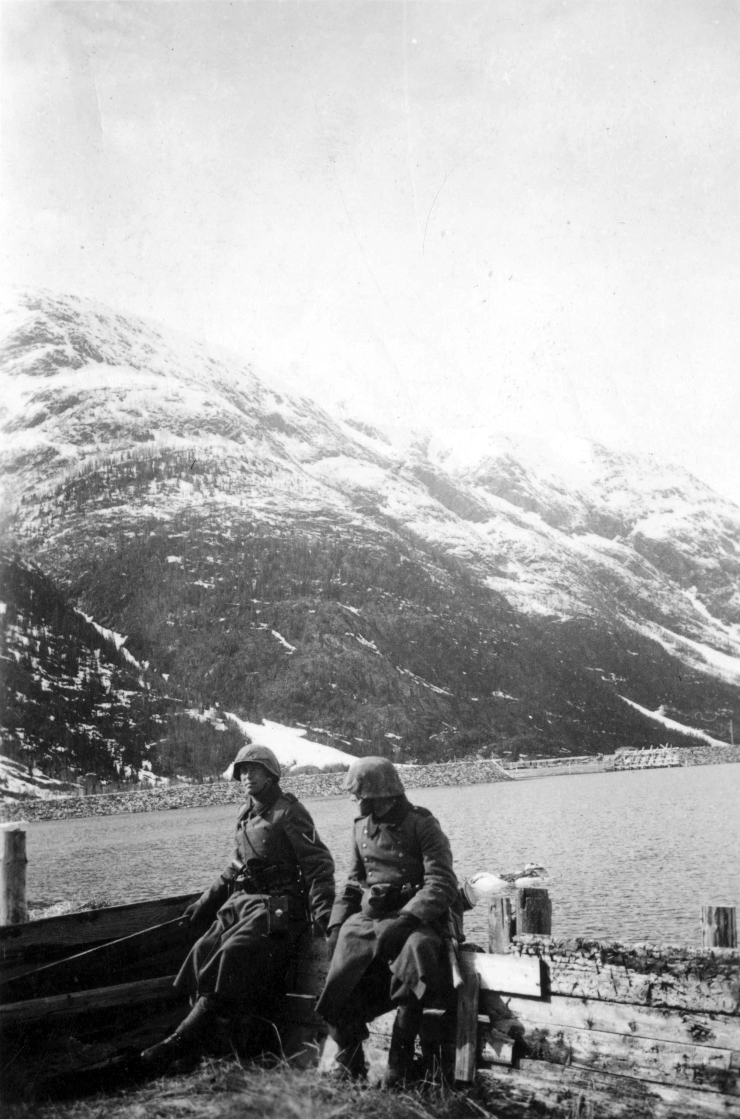 Vaktsoldater Mosjøen 11. mai 1940 Tittel / Title: Sannsynligvis Mosjøen 11.mai 1940 (Finneidfjord?) Dato / Date: 11. mai 1940 Fotograf / Photographer: Karl Marth Sted / Place: Ukjent/Unknown Eier / Owner Institution: Arkiv i Nordland Lenke / Link: Arkiv i Nordland Arkivreferanse /Archive reference: AIN.NA143.0119 Fra Dag Skogheims Privatarkiv